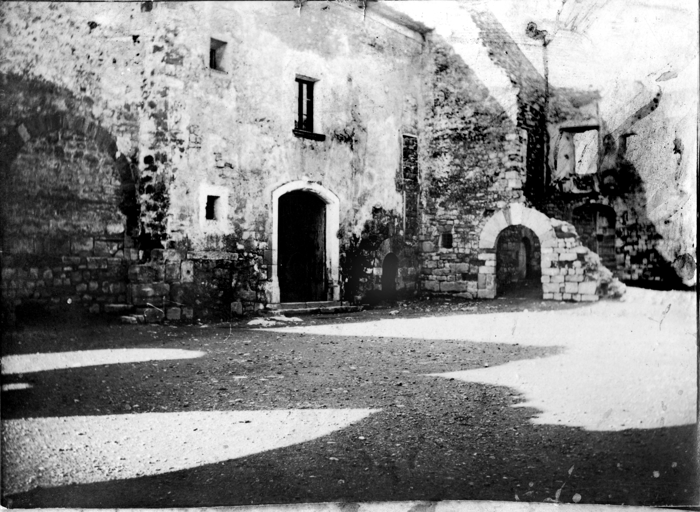 Castell de Barberà. Restes dels edificis nodoccidentals a començaments del s. XX.